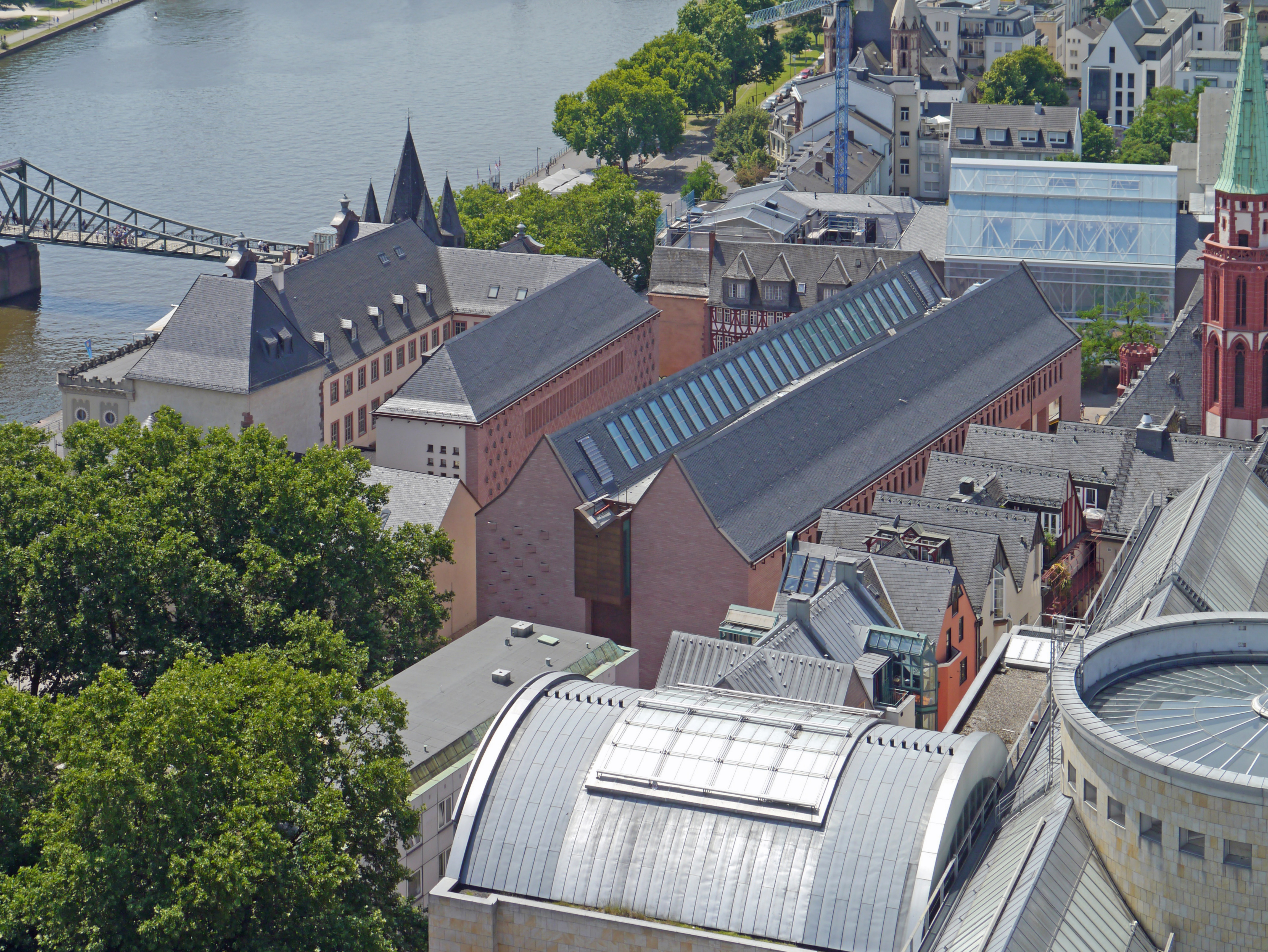 Das Historische Museum Frankfurt am Main, 2017 in der Ausbauphase, nach Fertigstellung des Gebäudes vom Domturm aus.